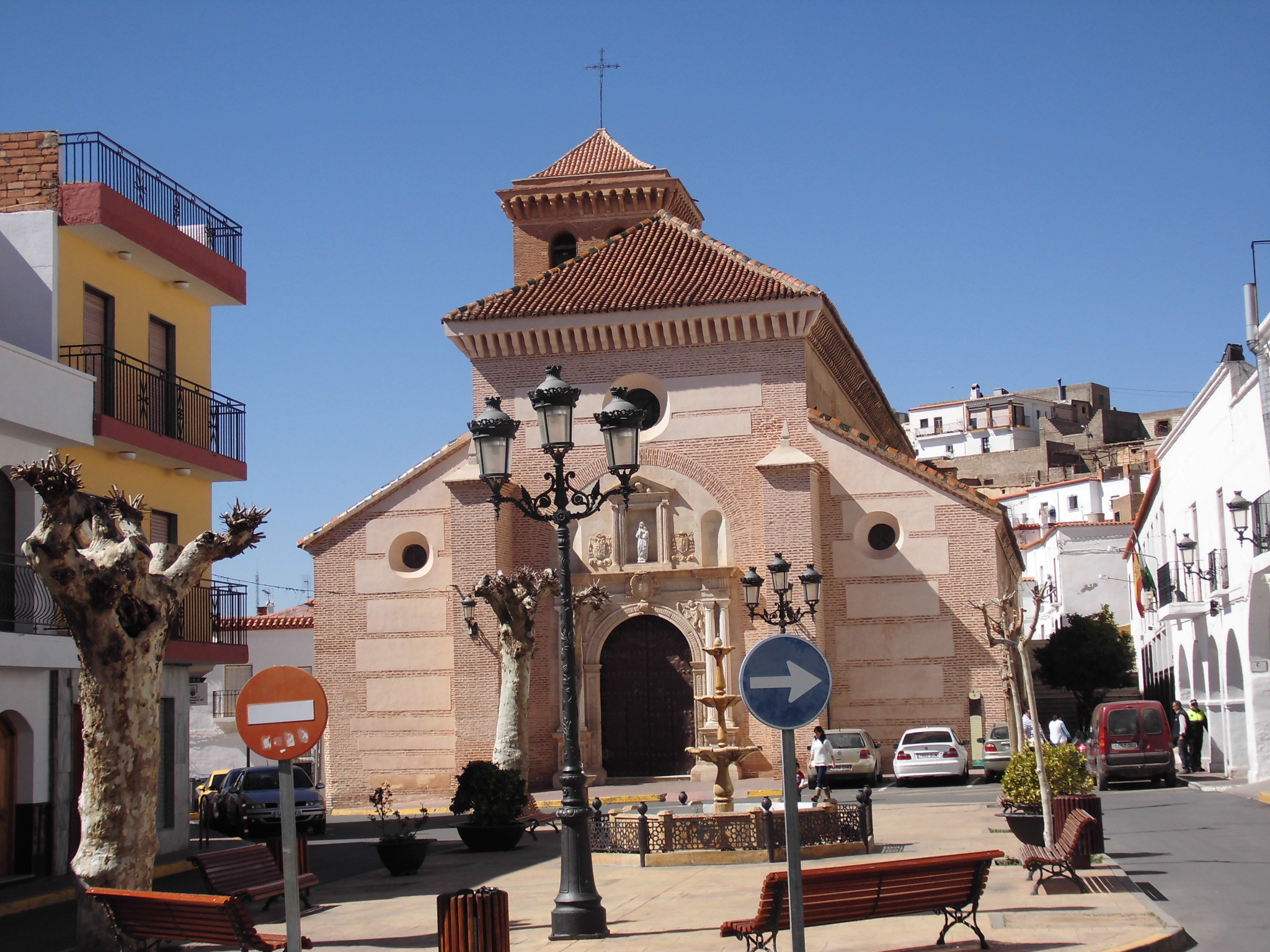 Fotografía de la Iglesia de la Anunciación en Fiñana, provincia de Almería, Andalucía, España.